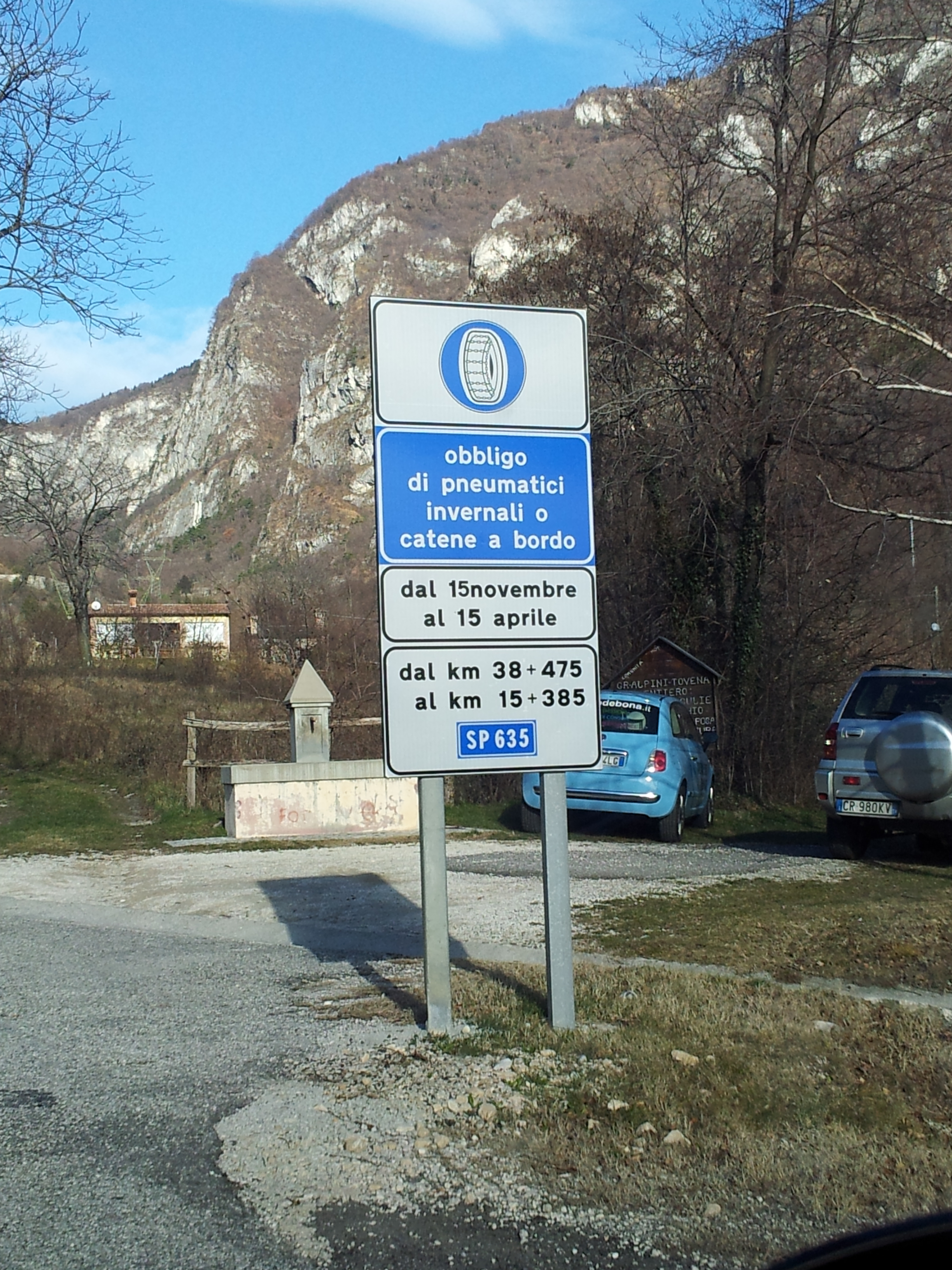 OBBLIGO CATENE SS635